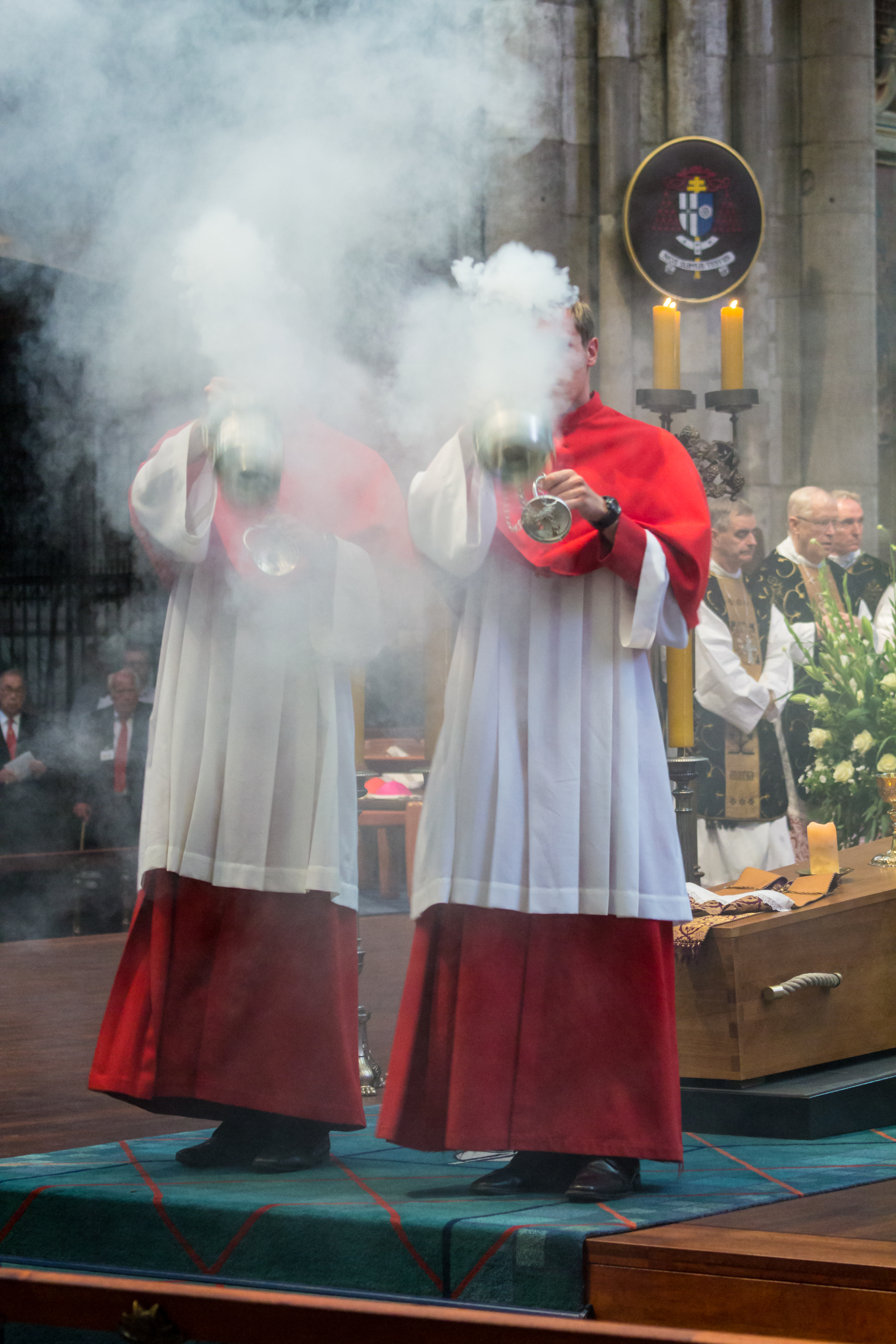 Exsequien Joachim Kardinal em. Meisner Foto: Zwei Thuriferar (Ministranten) schwenken Weihrauchfässer in Richtung der Gläubigen